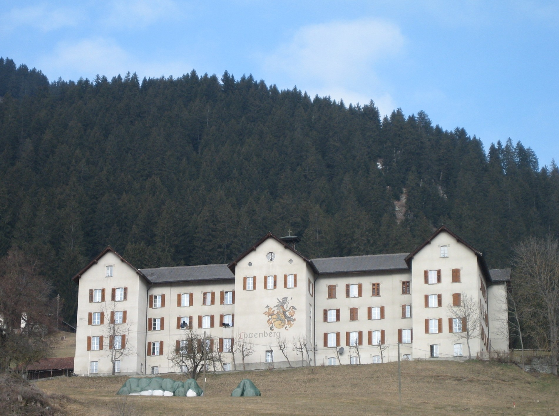 Neubau der Löwenberg aus 1890